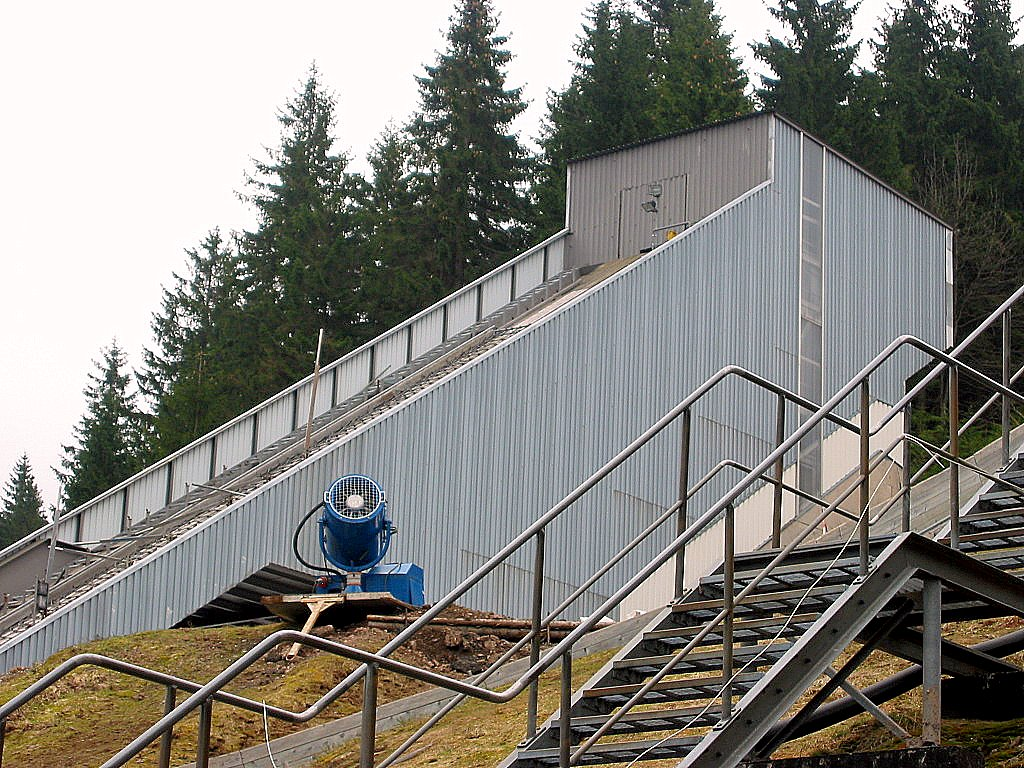 Normalschanze (K90) beim Schanzenkomplex im Kanzlersgrund in Oberhof